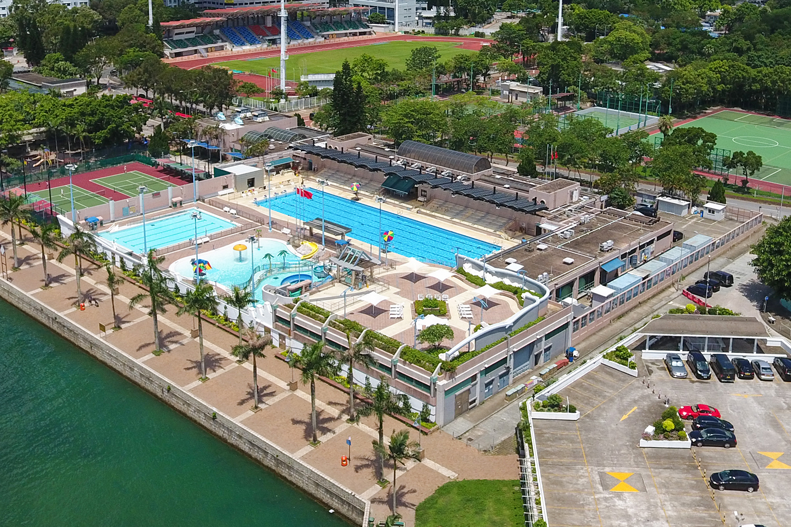 Sai Kung Swimming Pool